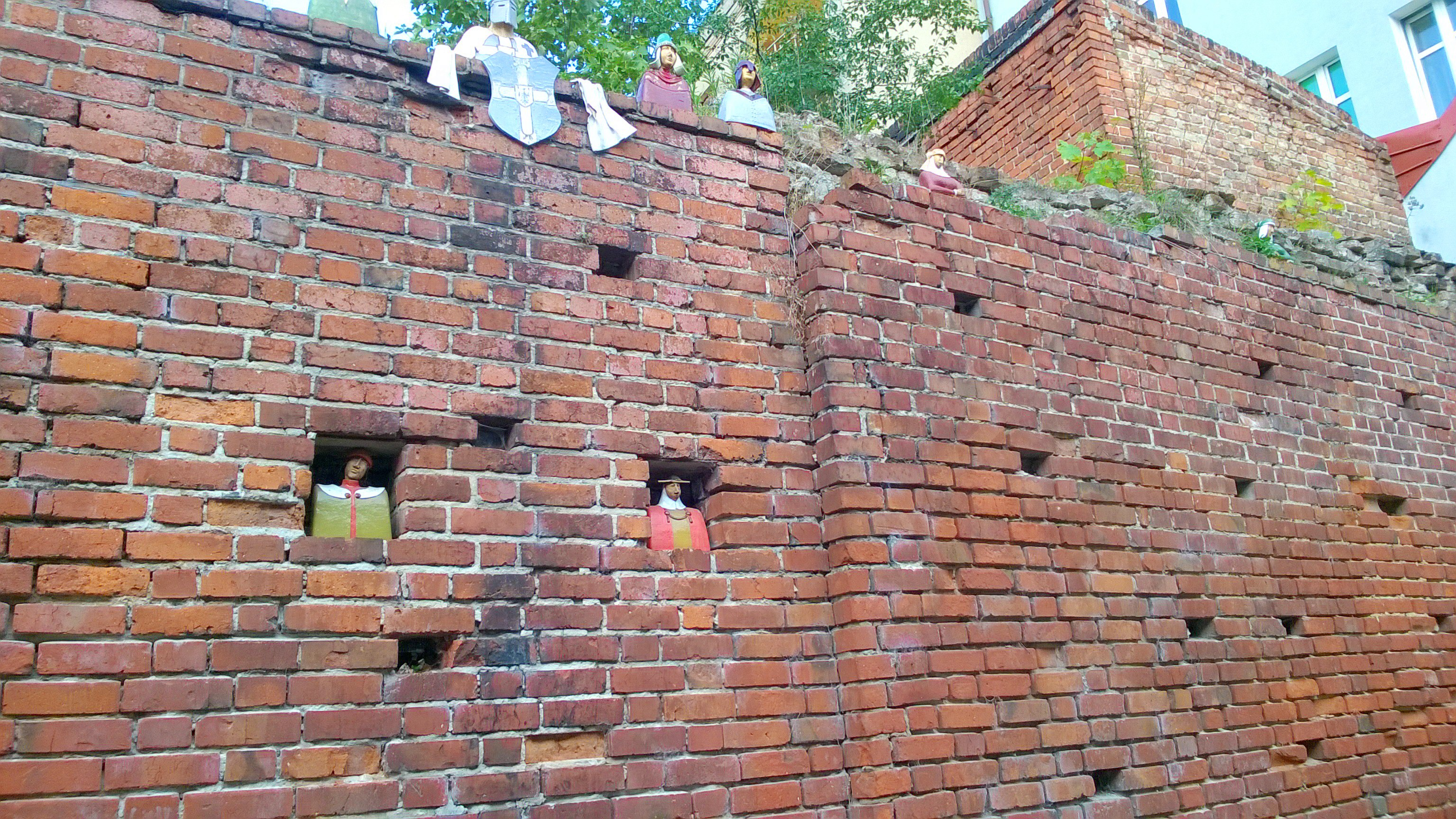 Mury Starego Miasta w Toruniu88